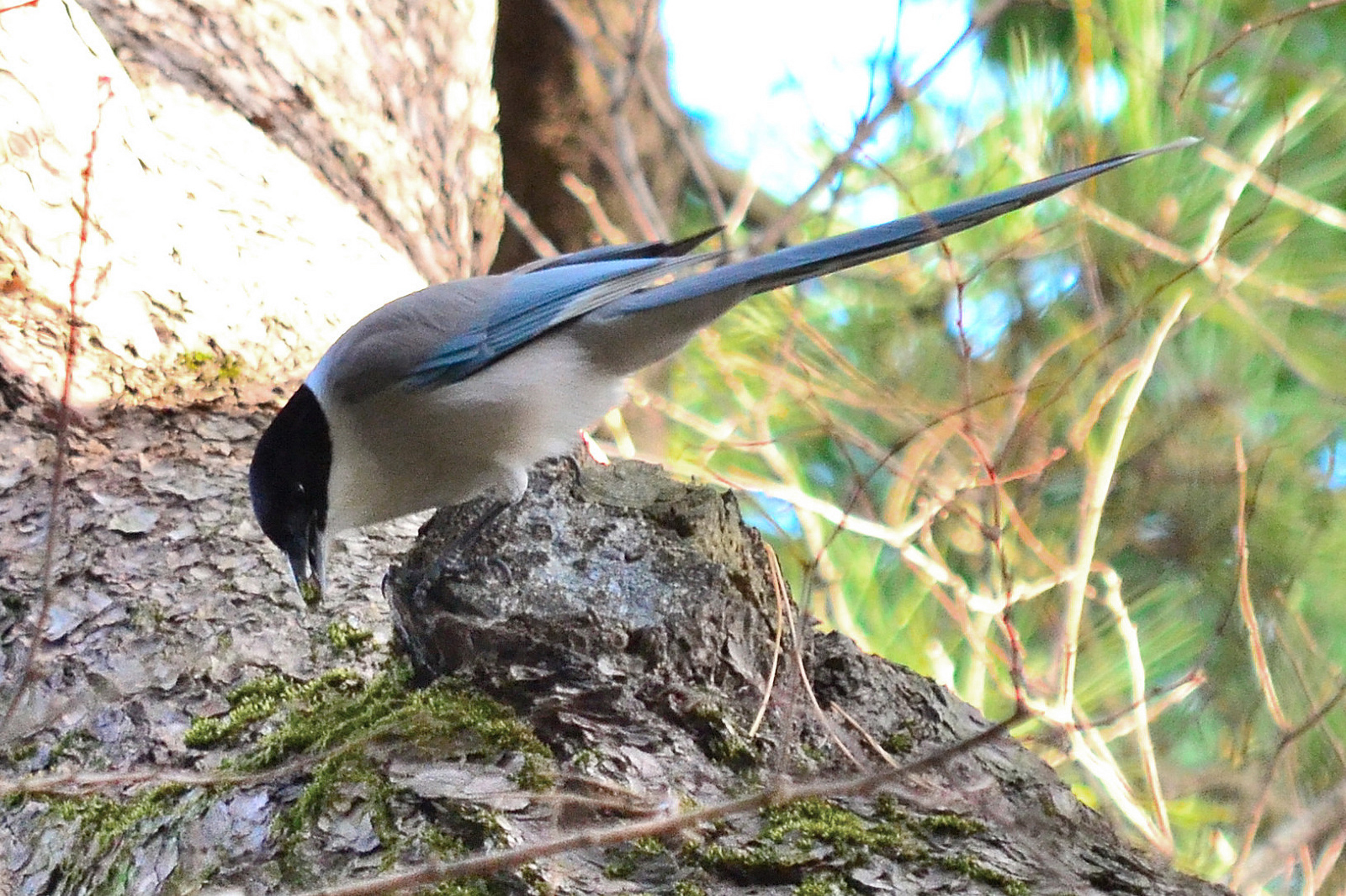 オナガ Azure-winged Magpie Cyanopica cyanus, Fujigaoka 2 Chome, Yokohama-shi, Kanagawa Prefecture, Japan.